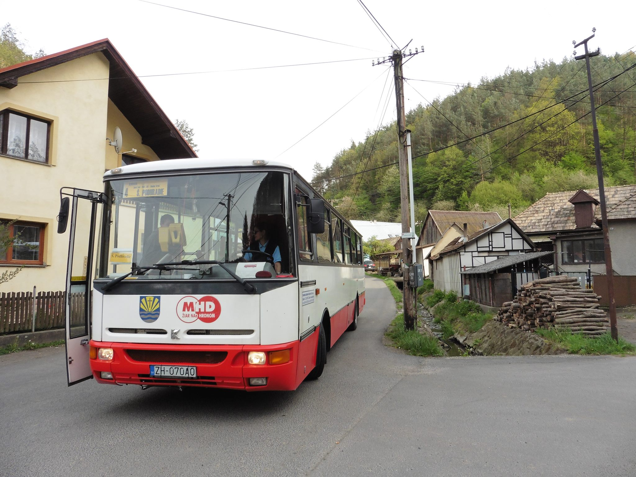 Created by Jozef Brzula